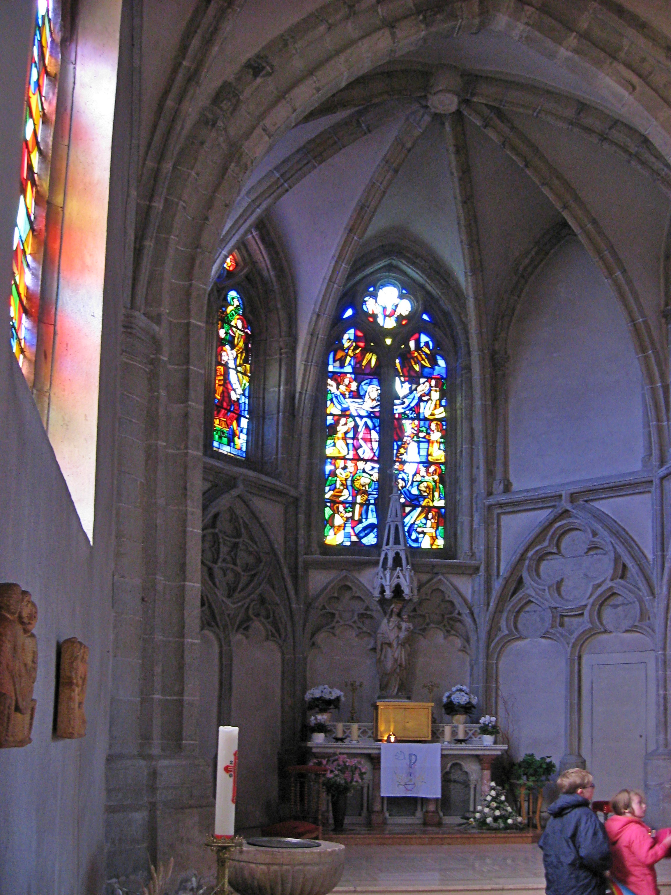 Seitenschiff mit Tabernakel und Taufbecken in Bouzonville